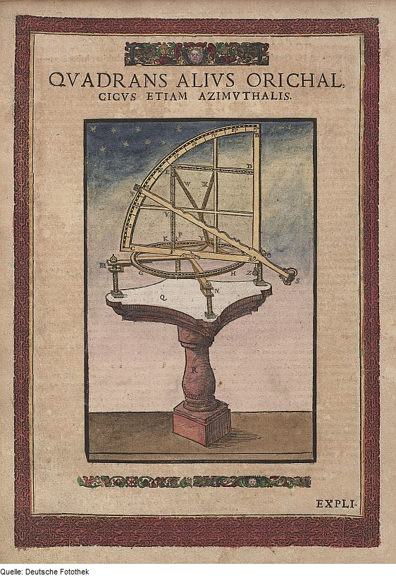 Original image description from the Deutsche Fotothek Astronomie & Vermessung & Messinstrument